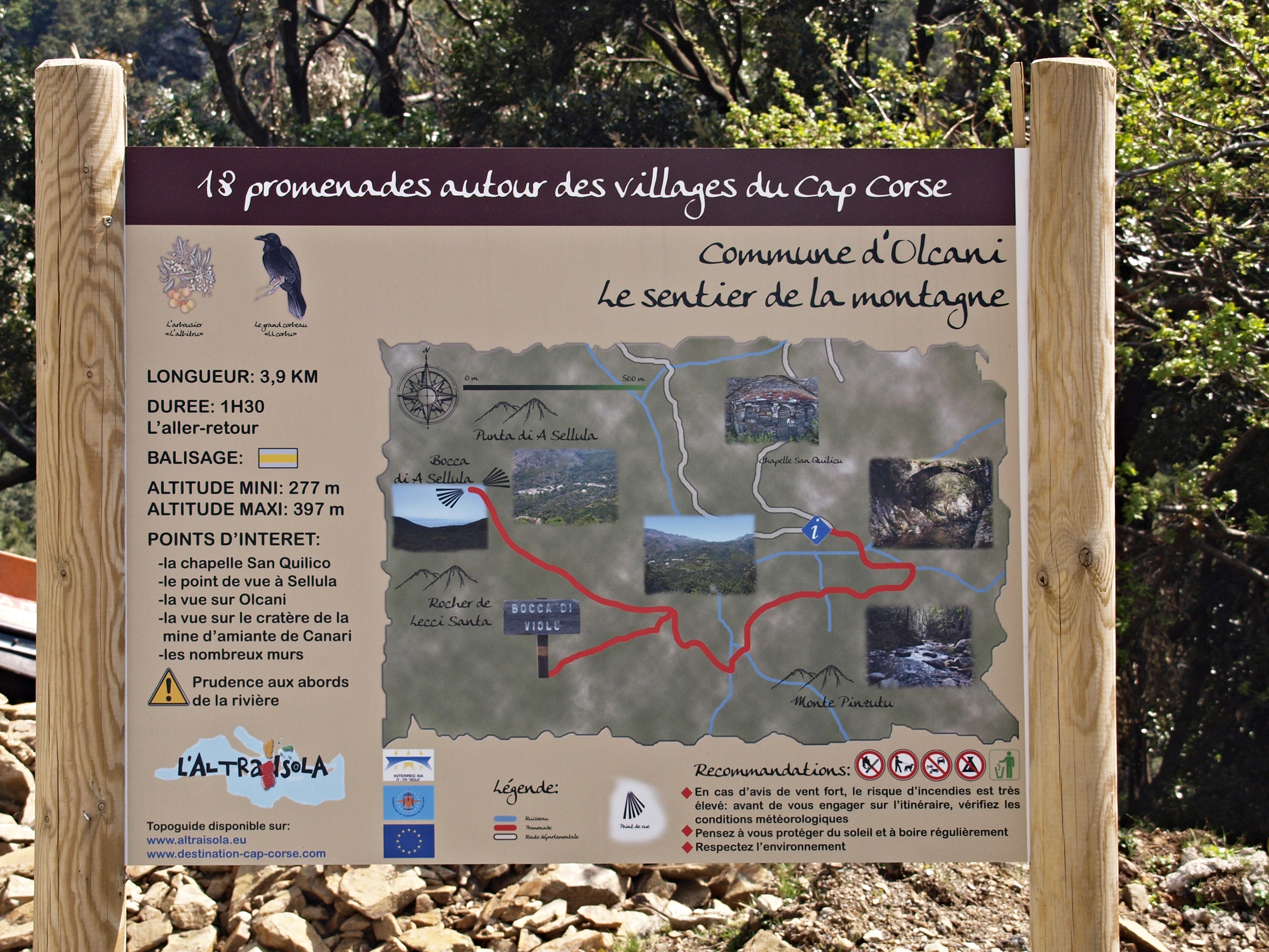 Olcani (Corsica) - Panneau Le sentier de la montagne